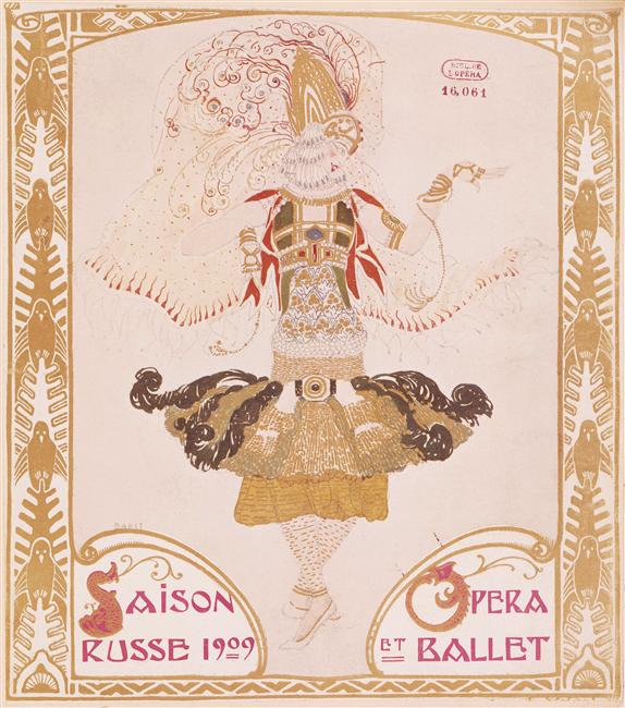 Couverture de la revue Comoedia. Première saison de ballets russes à Paris en 1909